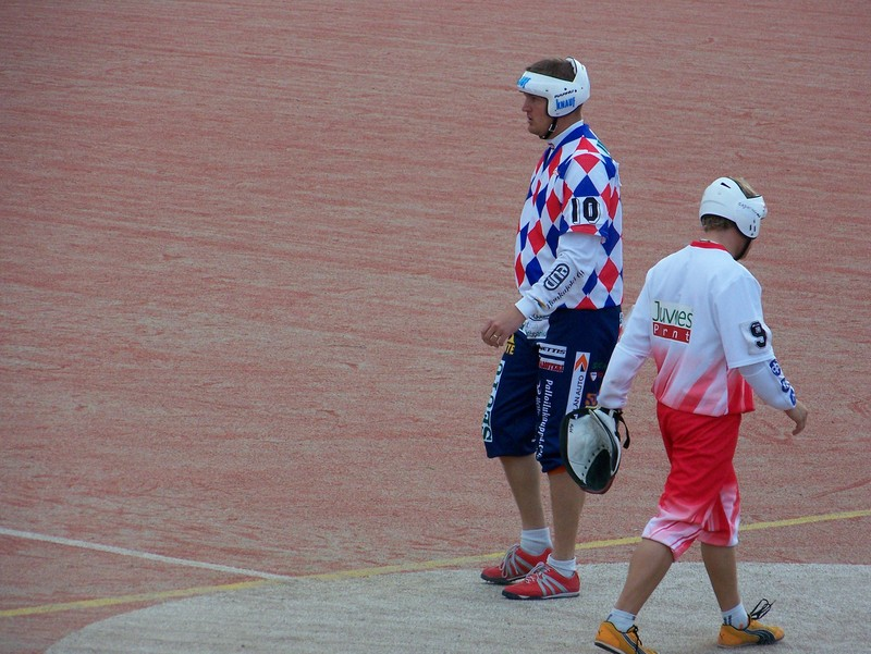 Sami Lindström Kesällä 2007 ottelussa Manse PP - KaMa